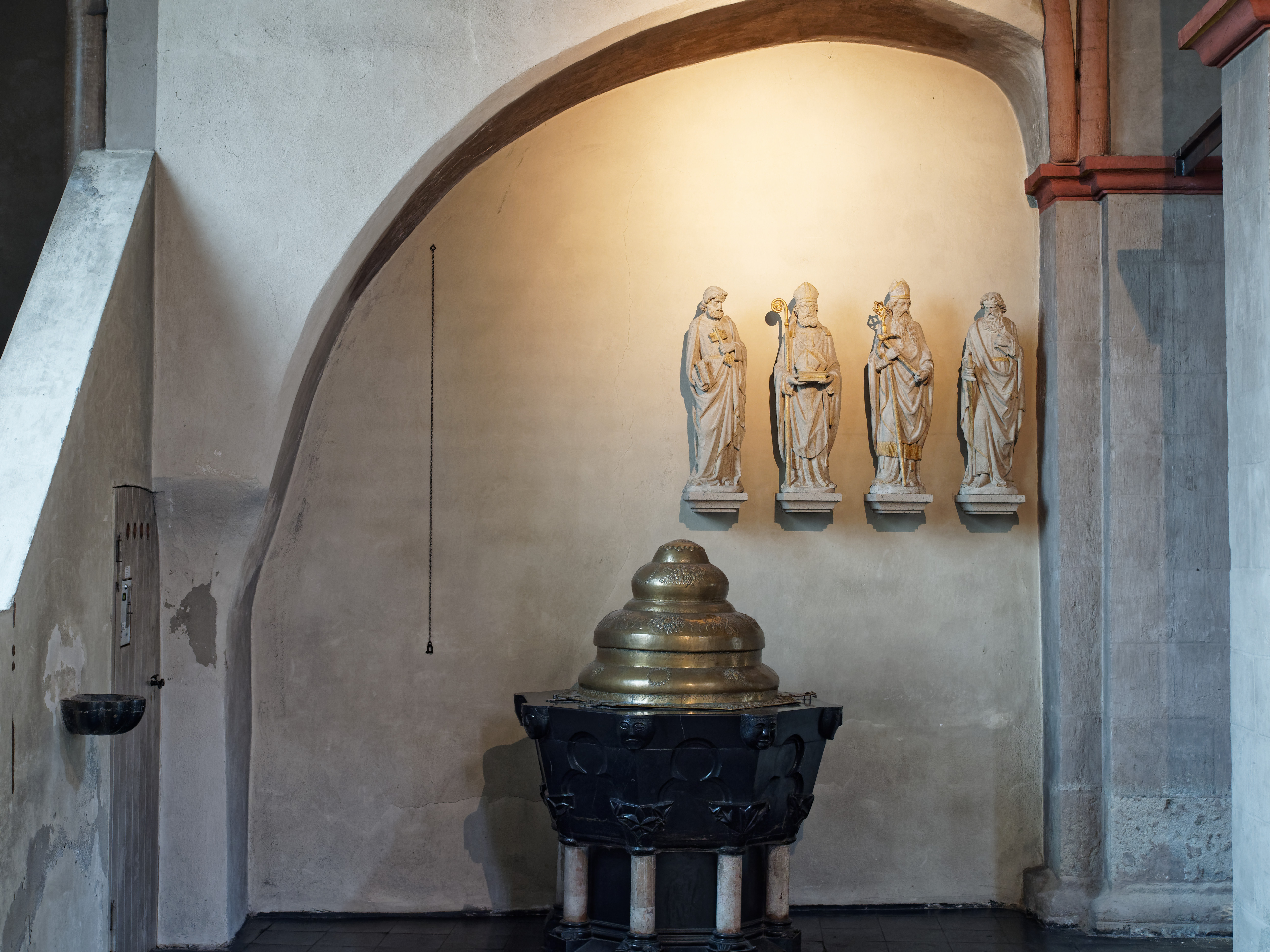 Köln, Romanische Kirche Sankt Maria in Lyskirchen, Taufbecken. Das Taufbecken stammt aus dem 12. Jahrhundert, die Haube darüber ist kupfervergoldet und stammt aus dem 17. Jahrhundert. Die Steinfiguren darüber vom früheren Hochaltar stellen von links nach rechts Petrus, Maternus, Nikolaus und Paulus dar.